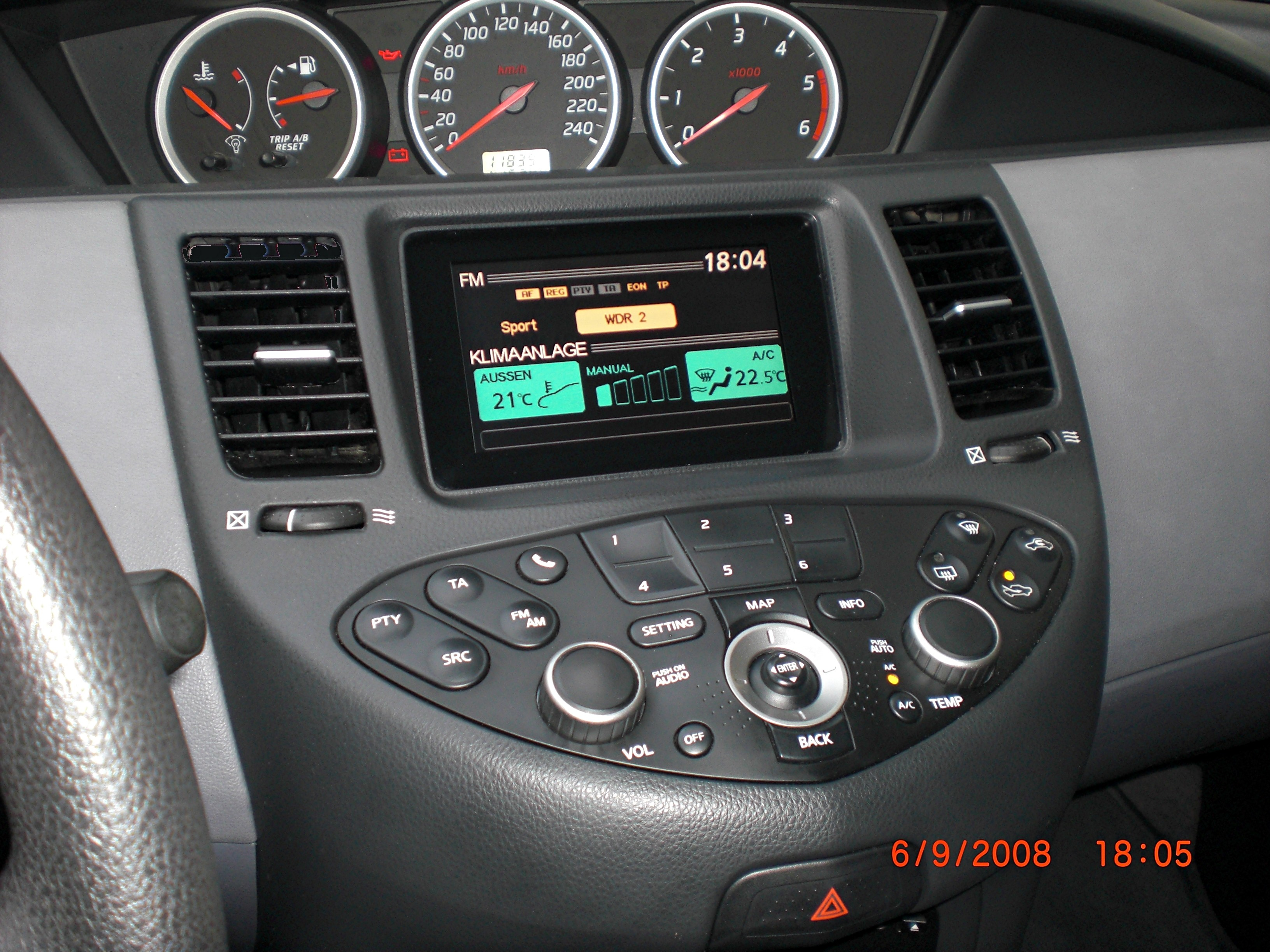 Nissan N-FORM System verbaut in Nissan Primera WP12